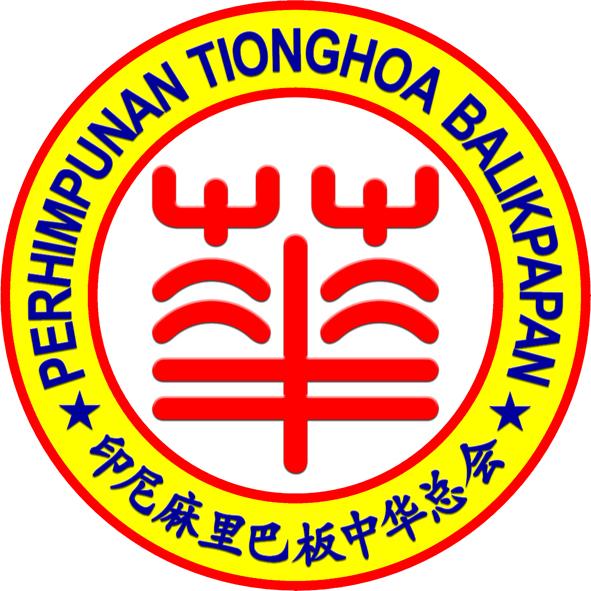 perhimpunan tionghoa balikpapan